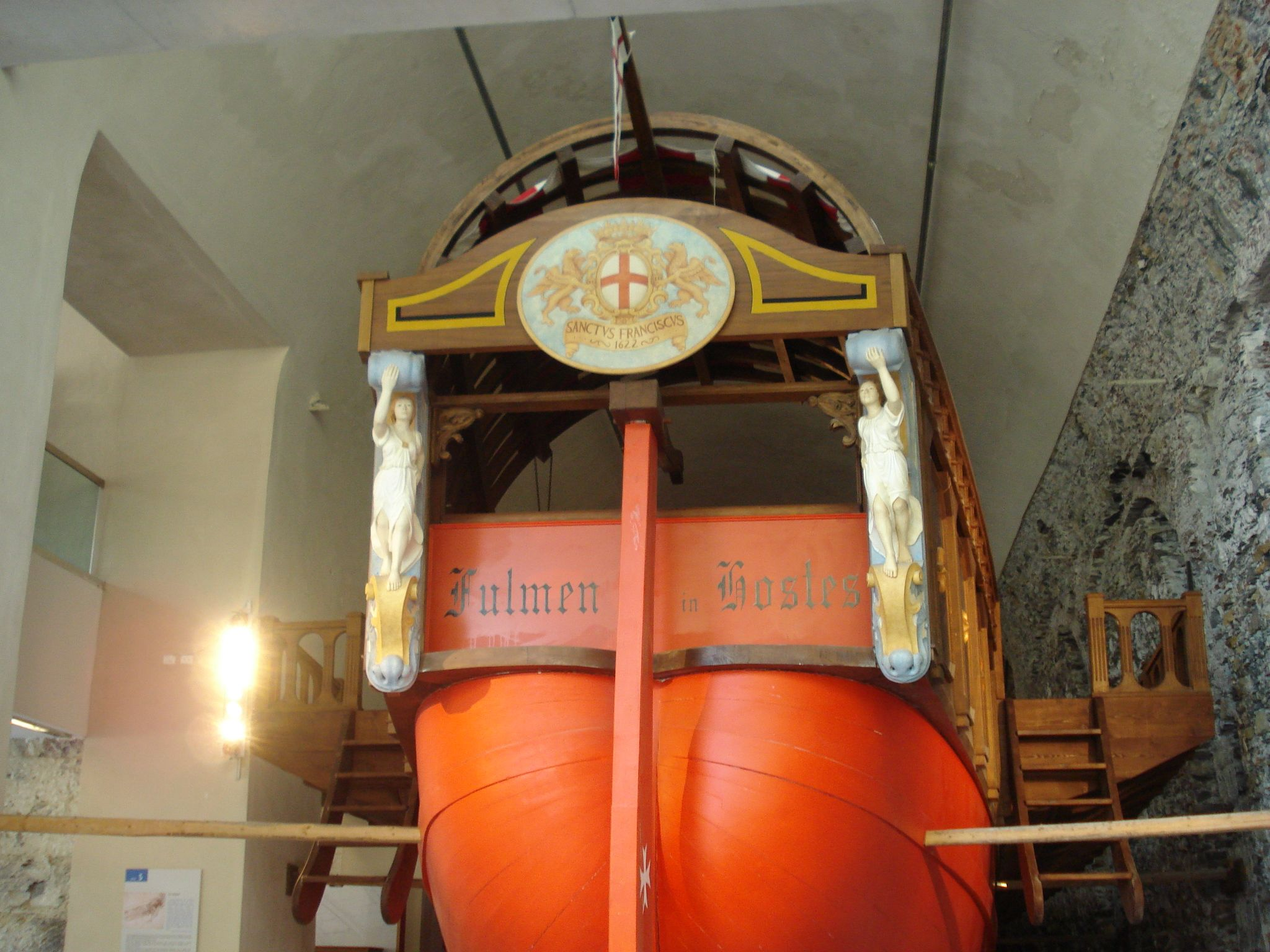 Galata Museo del Mare, Genova